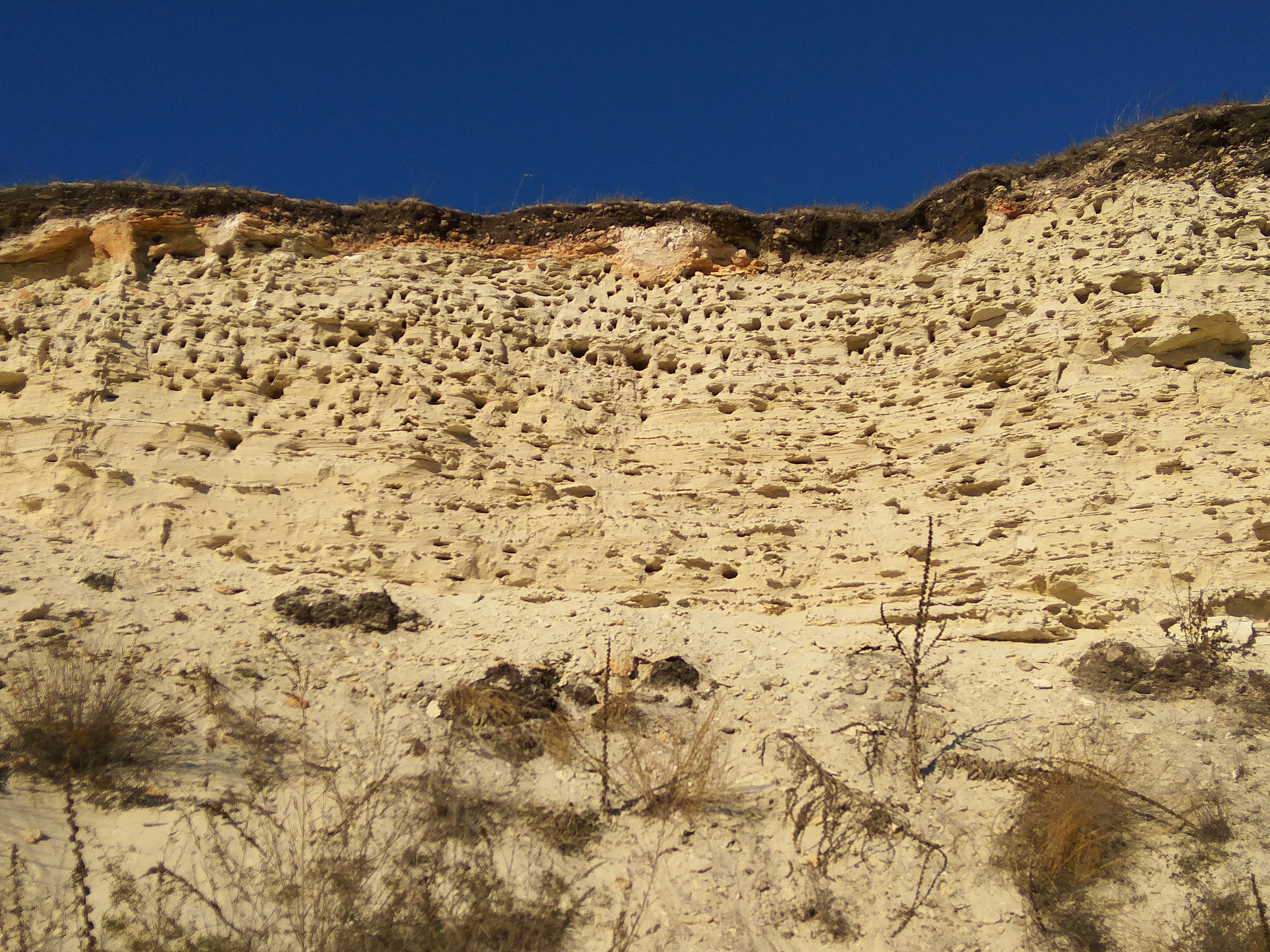 Краєвид у с. Садківці (Могилів-Подільський район)